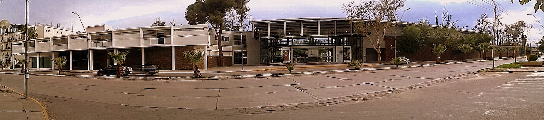 Panorámica del museo de Bellas Artes desde Av. del Libertador